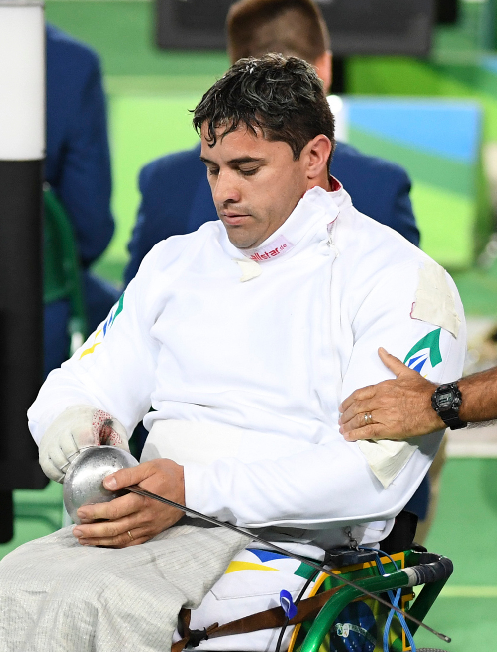 Rio de Janeiro - O brasileiro Jovane Guissone, medalha de ouro em Londres 2012, perde nas quartas de final da esgrima, categoria B para o ucraniano Oleg Naumenko